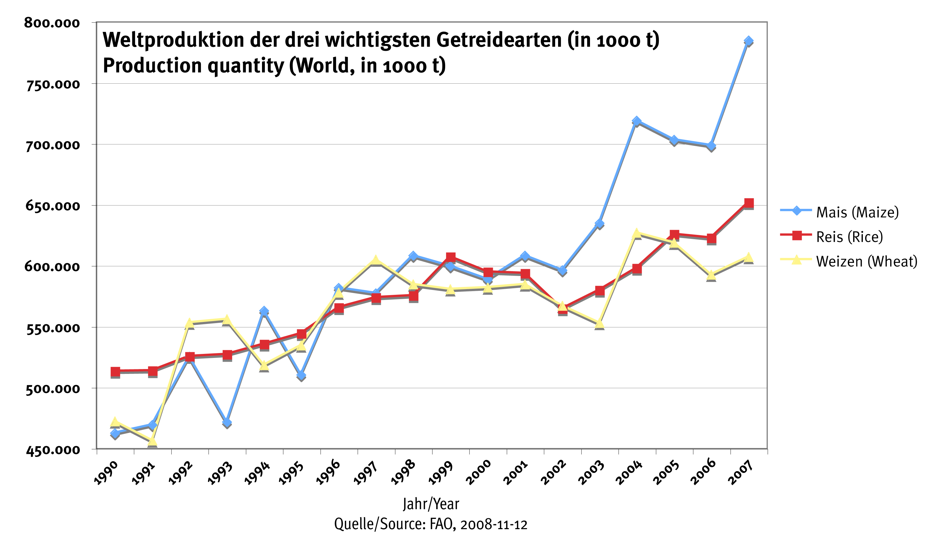 Produktionsmengen der wichtigsten Getreidearten weltweit 1990–2007